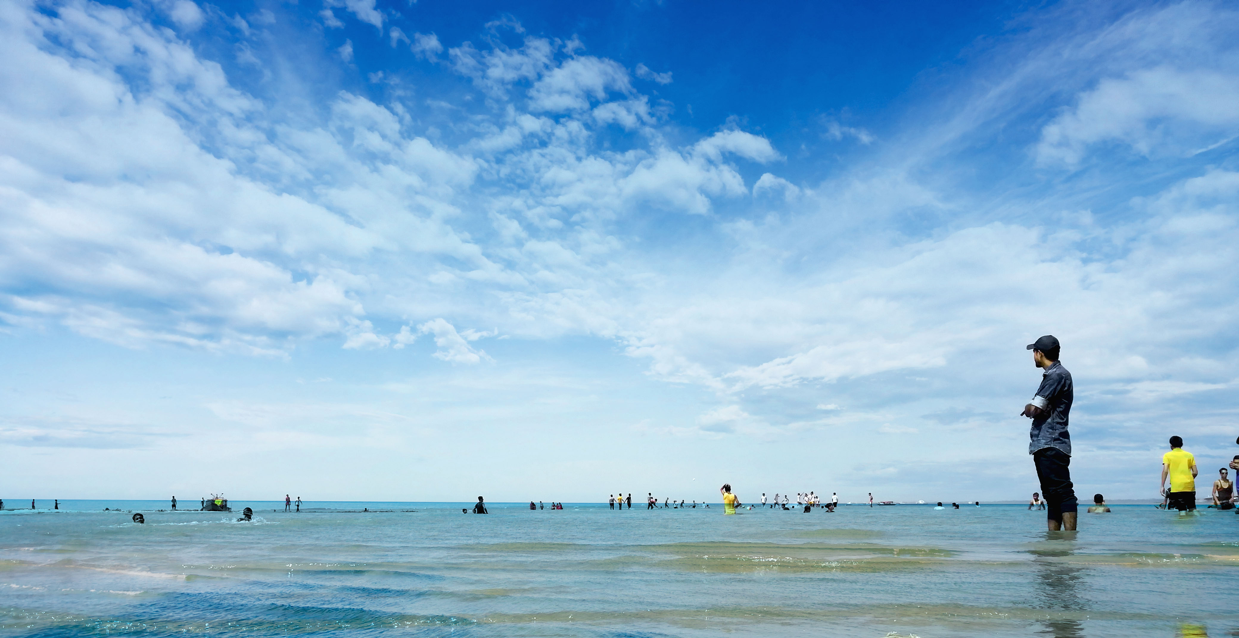 মিনি কক্সবাজার চাঁদপুর